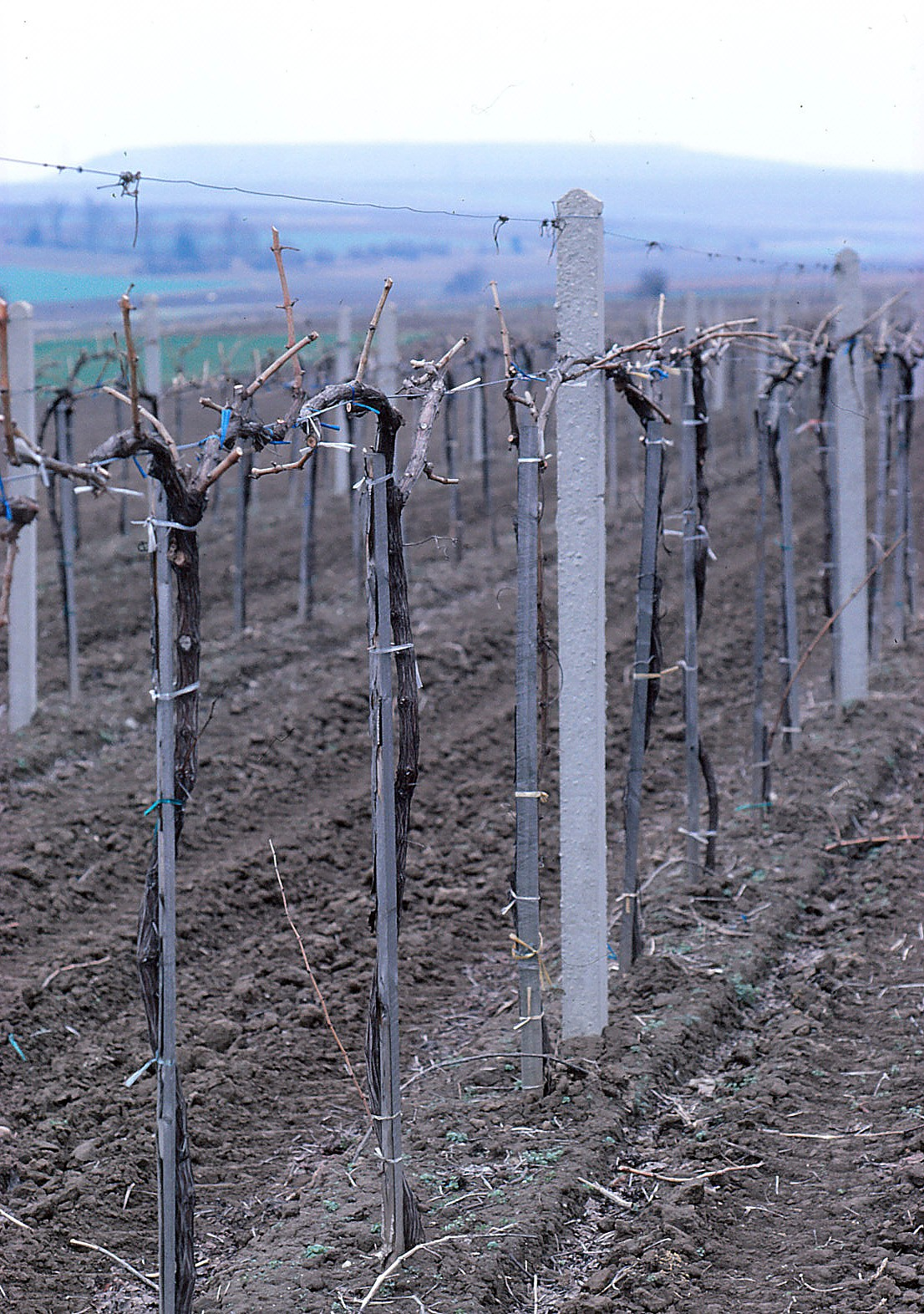 Hochkordon mit kurzem Kordon